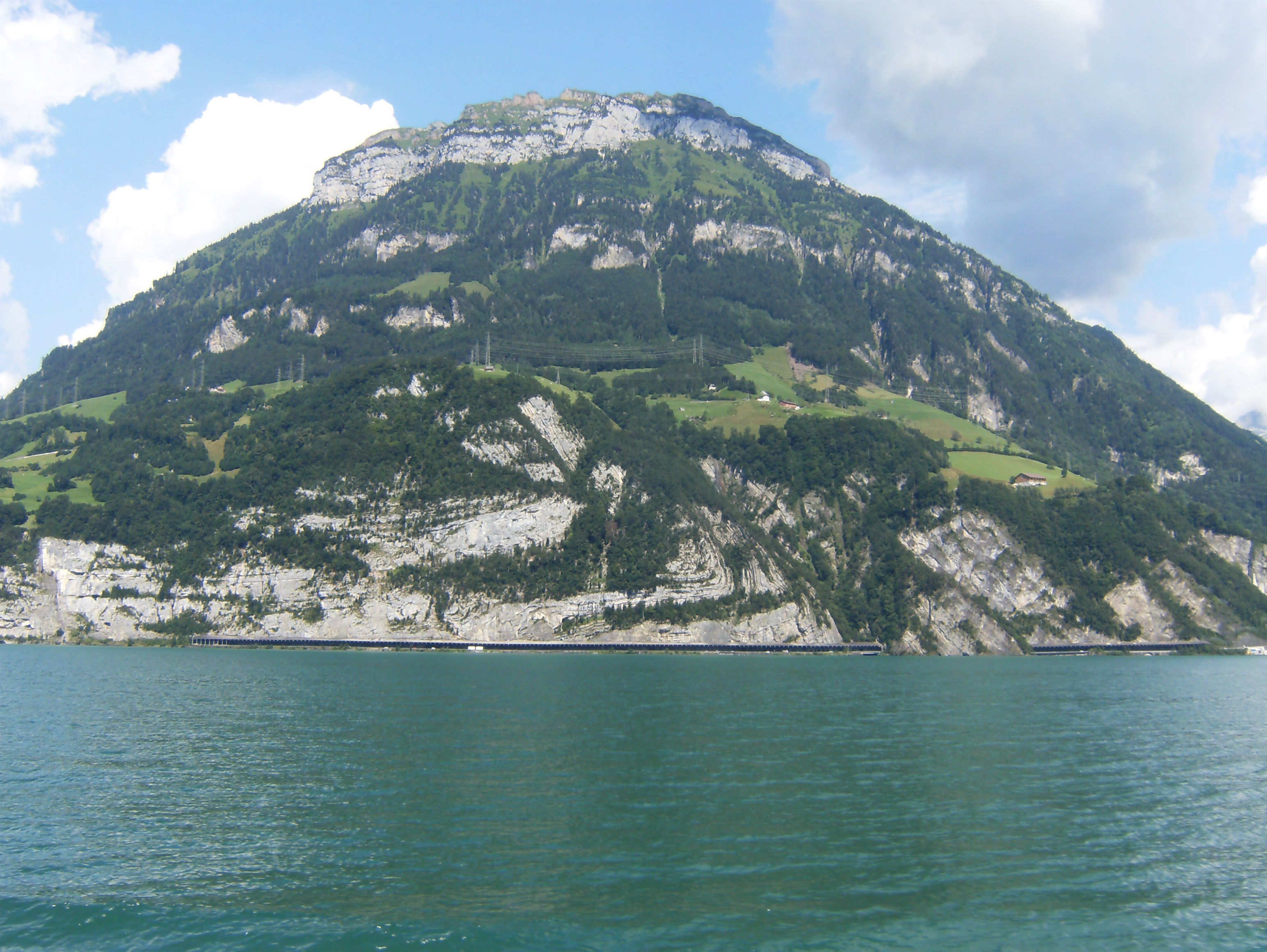 Fronalpstock, Urnersee